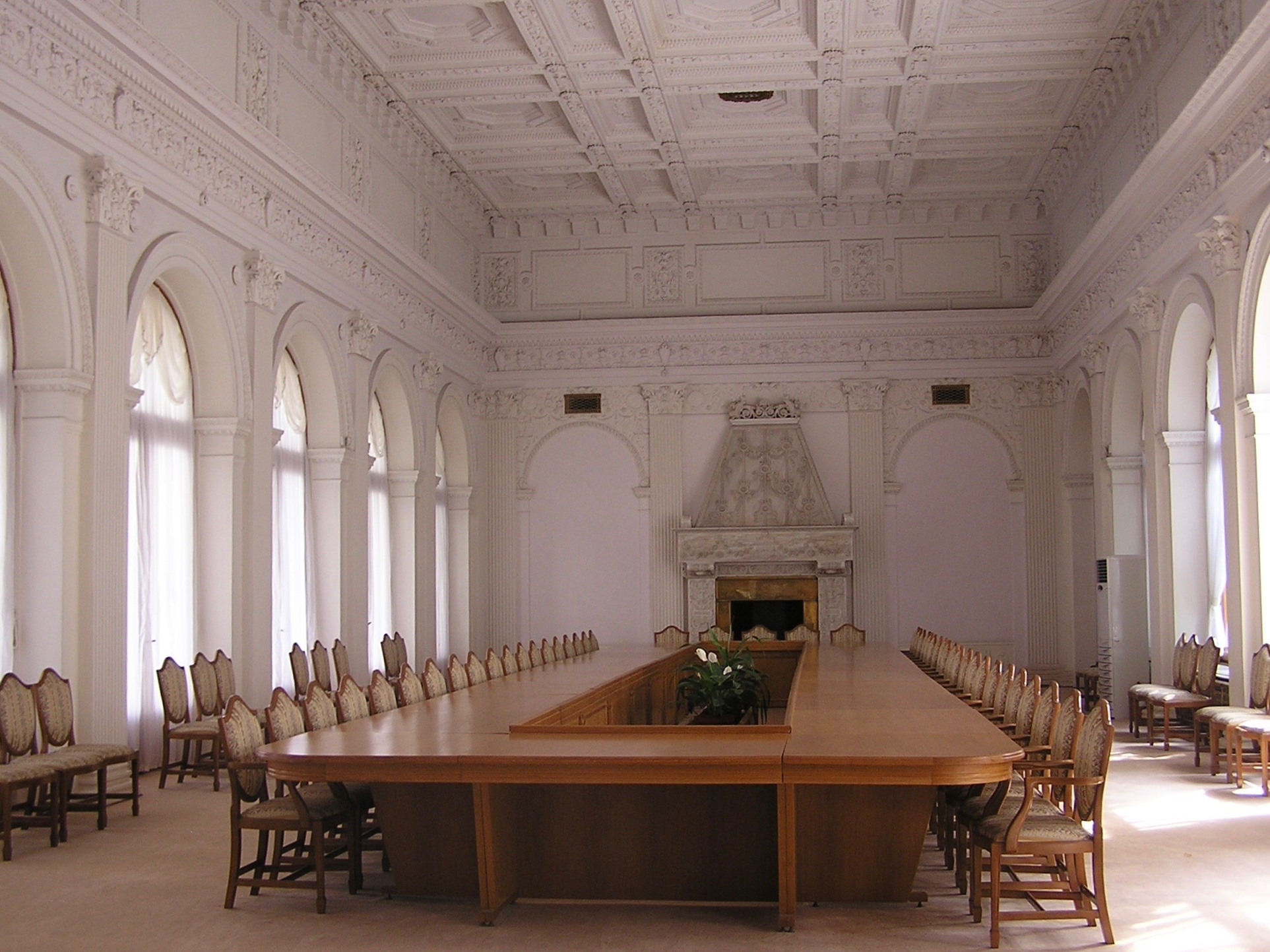 Ливадийский дворец